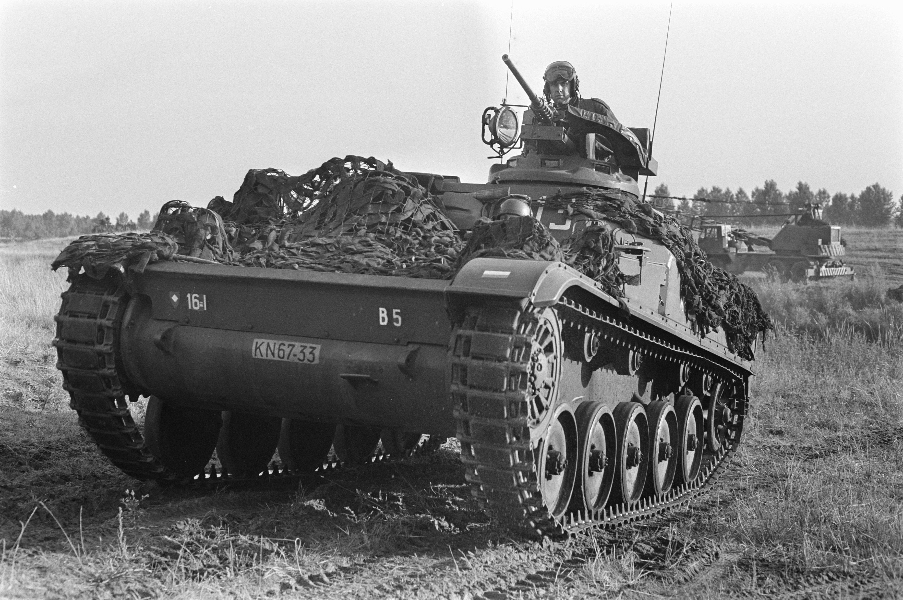 Collectie / Archief : Fotocollectie Anefo Reportage / Serie : Legeroefening Konings Gambiet in Duitsland Beschrijving : Pantserwagen Datum : 9 augustus 1968 Locatie : Duitsland Trefwoorden : legeroefeningen, rupsvoertuigen Fotograaf : Fotograaf Onbekend / Anefo Auteursrechthebbende : Nationaal Archief Materiaalsoort : Negatief (zwart/wit) Nummer archiefinventaris : bekijk toegang 2.24.01.05 Bestanddeelnummer : 921-5849